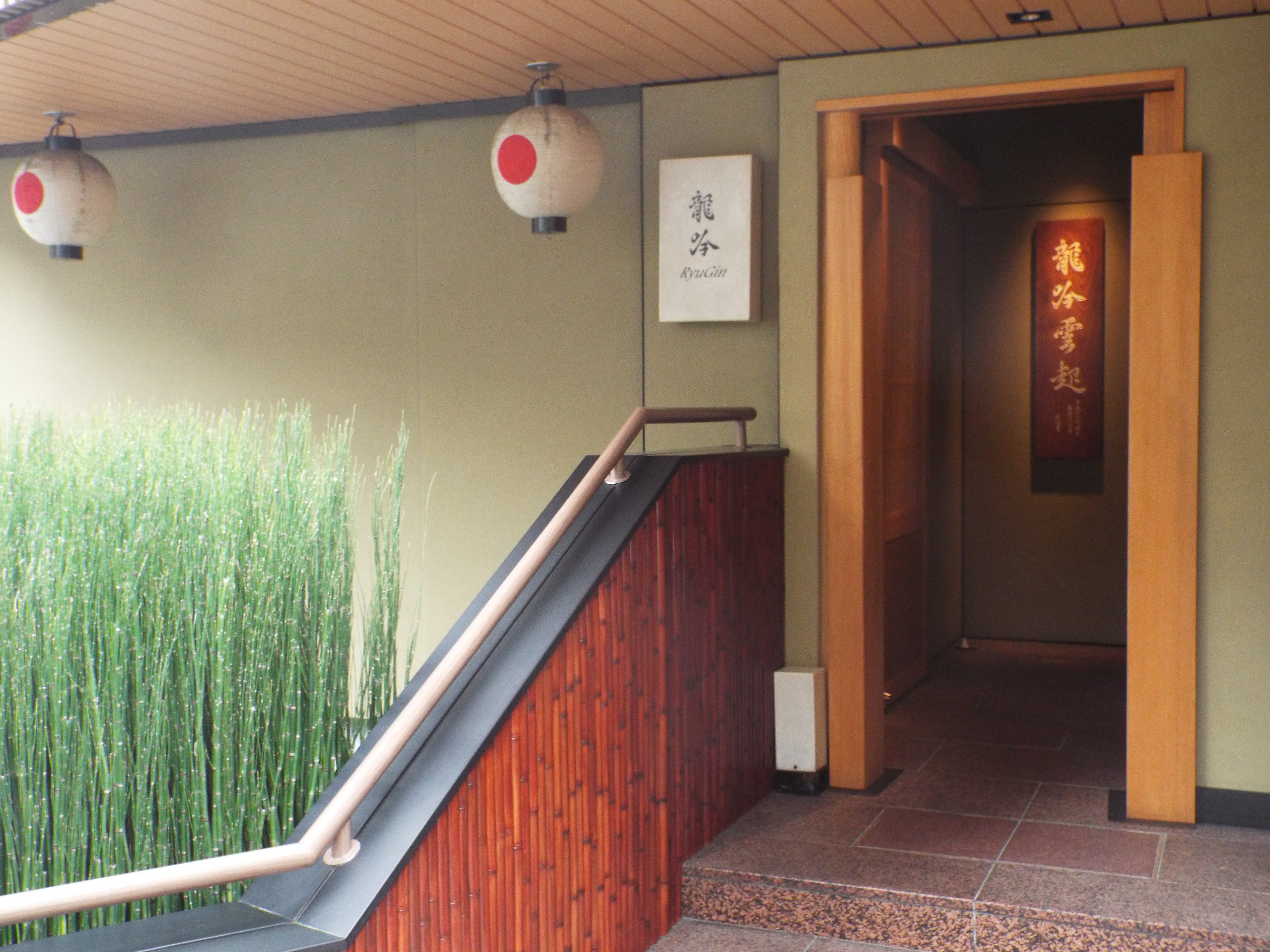 Restaurant in Roppongi